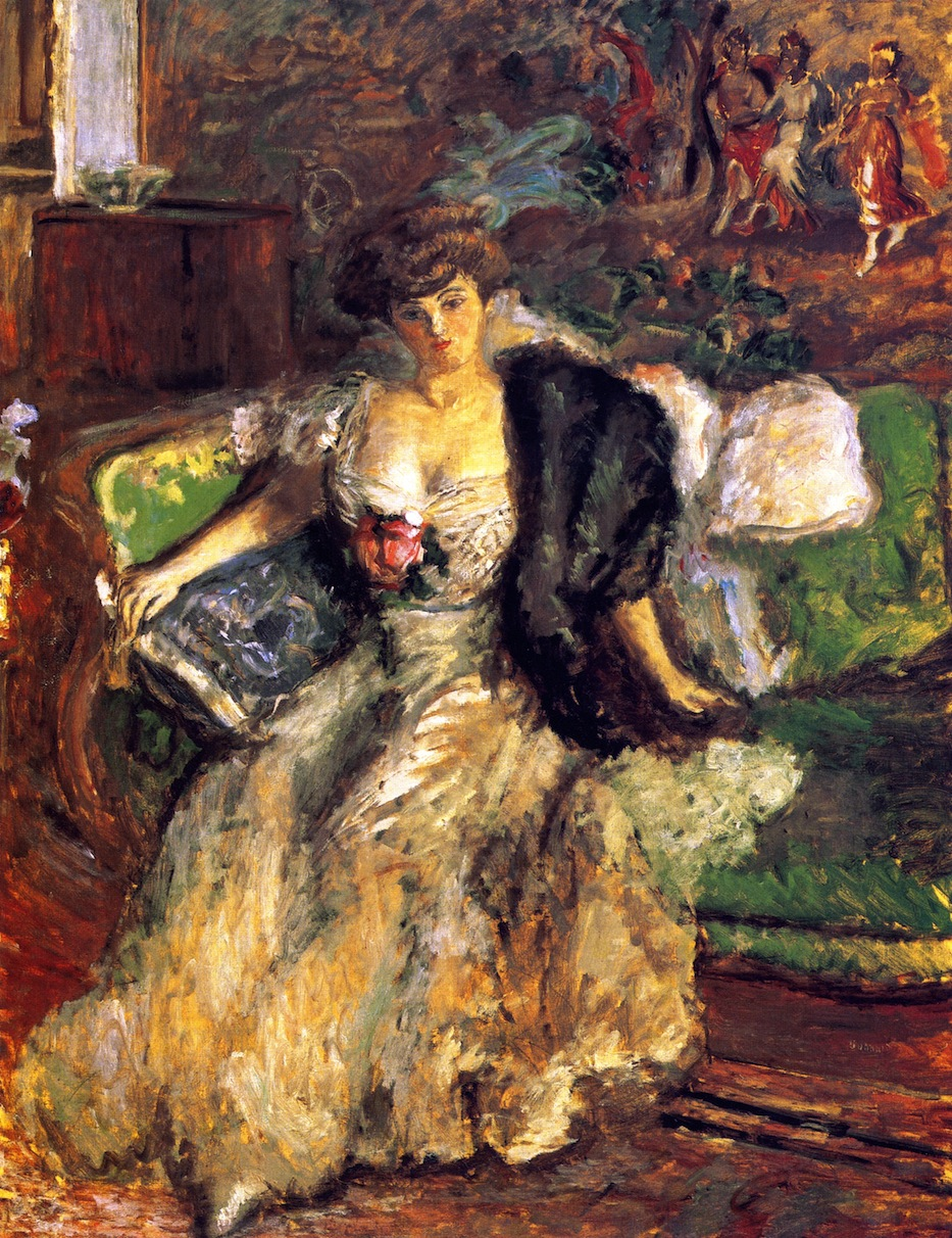 Portrait of Misia Sert, 145 x 114 cm, Thyssen-Bornemisza Museum